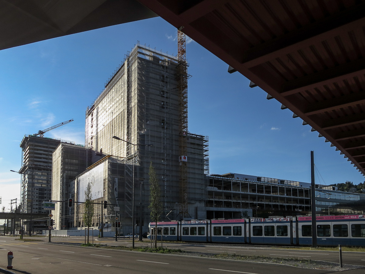 Baustelle Toni-Areal in Zürich-West im Juli 2012